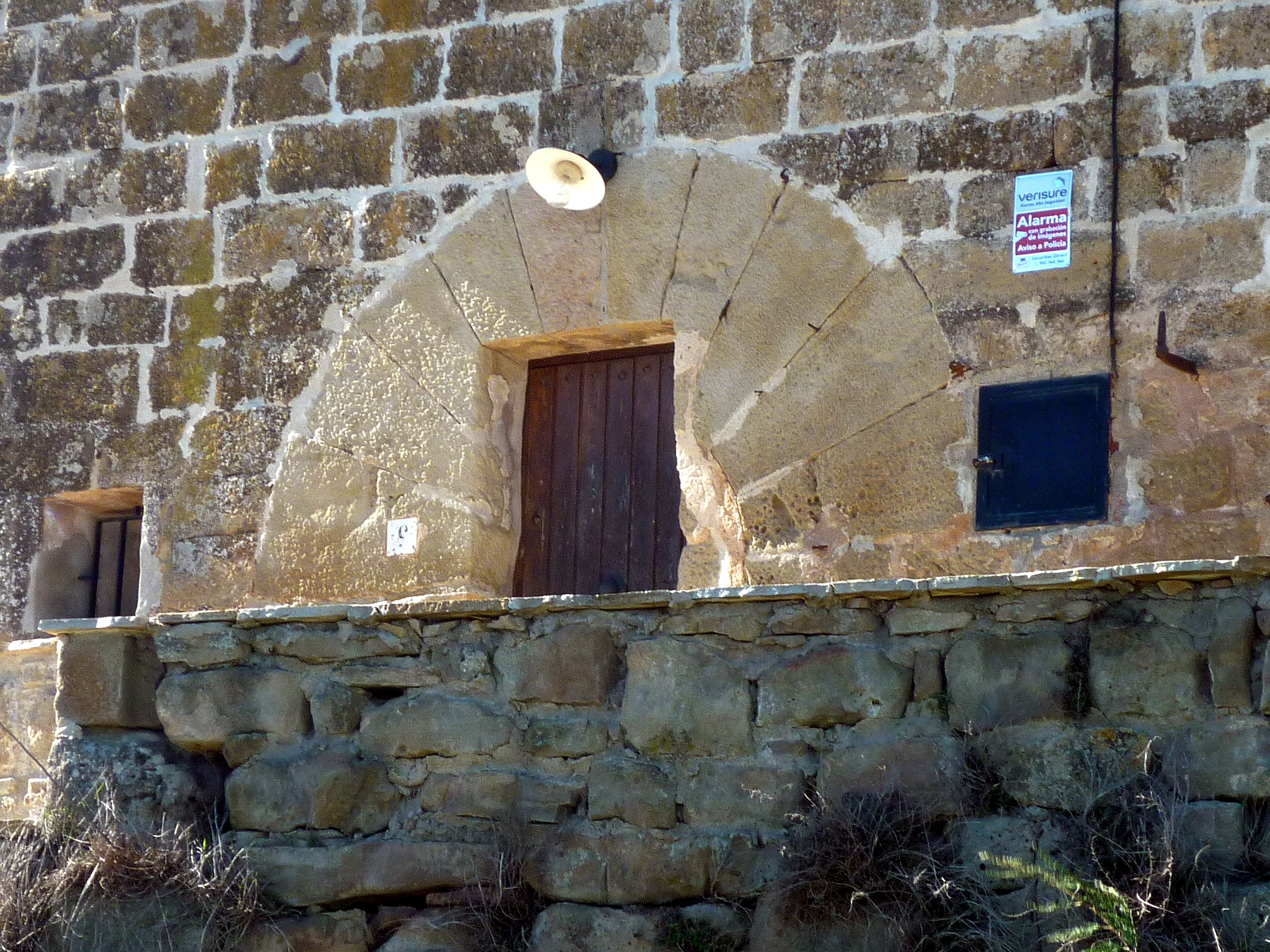 Mas de Pedrafita (Biosca): portal a la façana de llevant